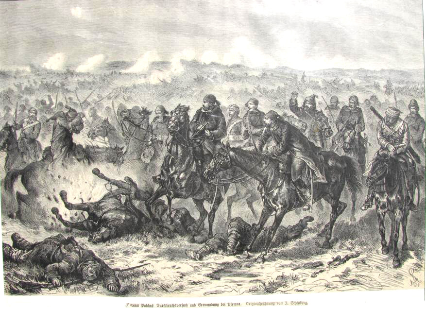 Osman Paschas Durchbruchversuch und Verwundung bei Plewna. Originalzeichnung von J. Schönberg. Holzschnitt "SM (1)877". Aus einer deutschen Zeitung von 1877.